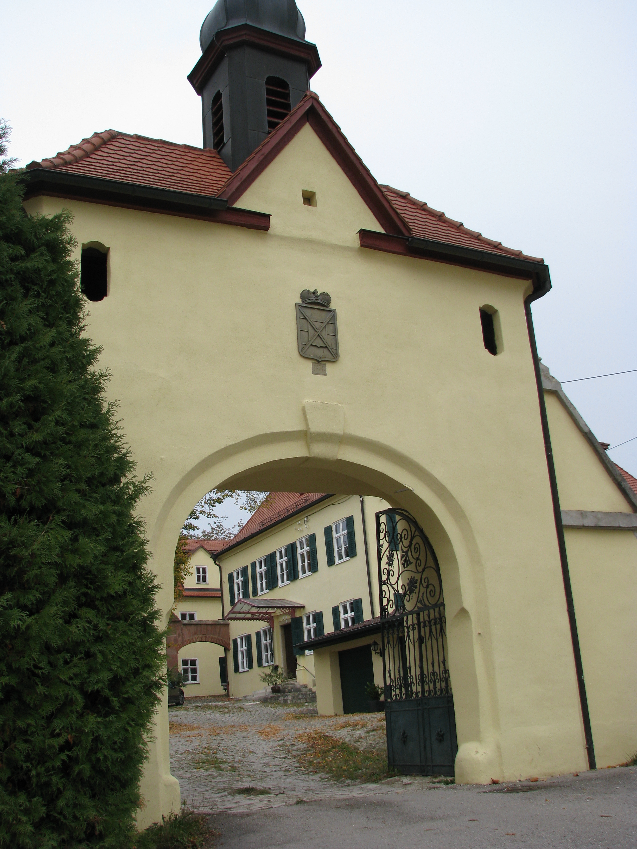 Kreuth (Schloßkreuth), Ortsteil von Heideck im mittelfränkischen Landkreis Roth, Torbau des 17. Jahrhunderts